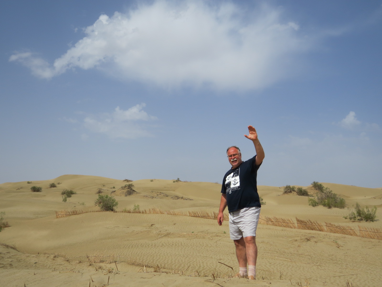 Из пустинята Такламакан.